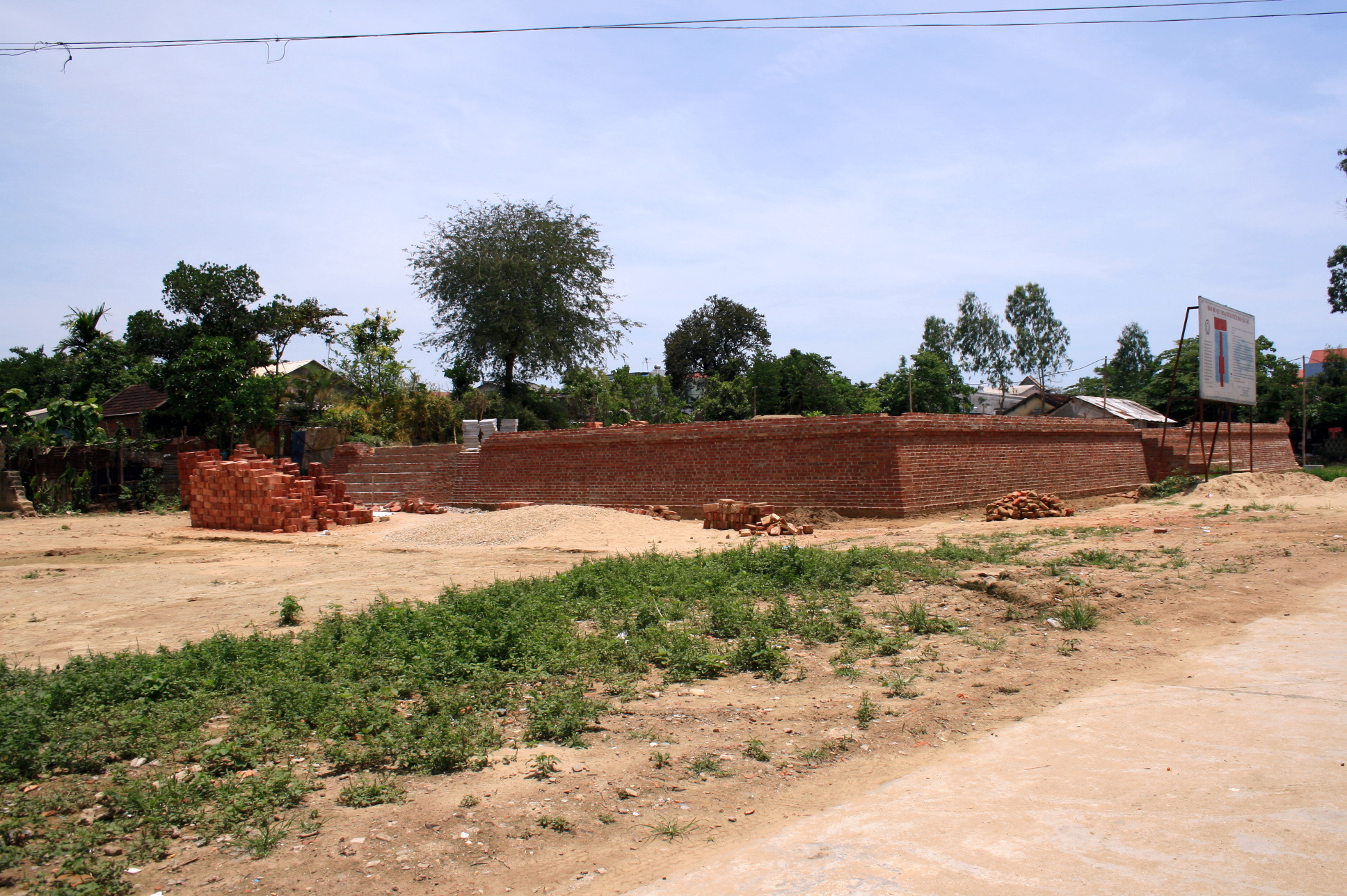 Phục chế Đàn xã tắc triều Nguyễn